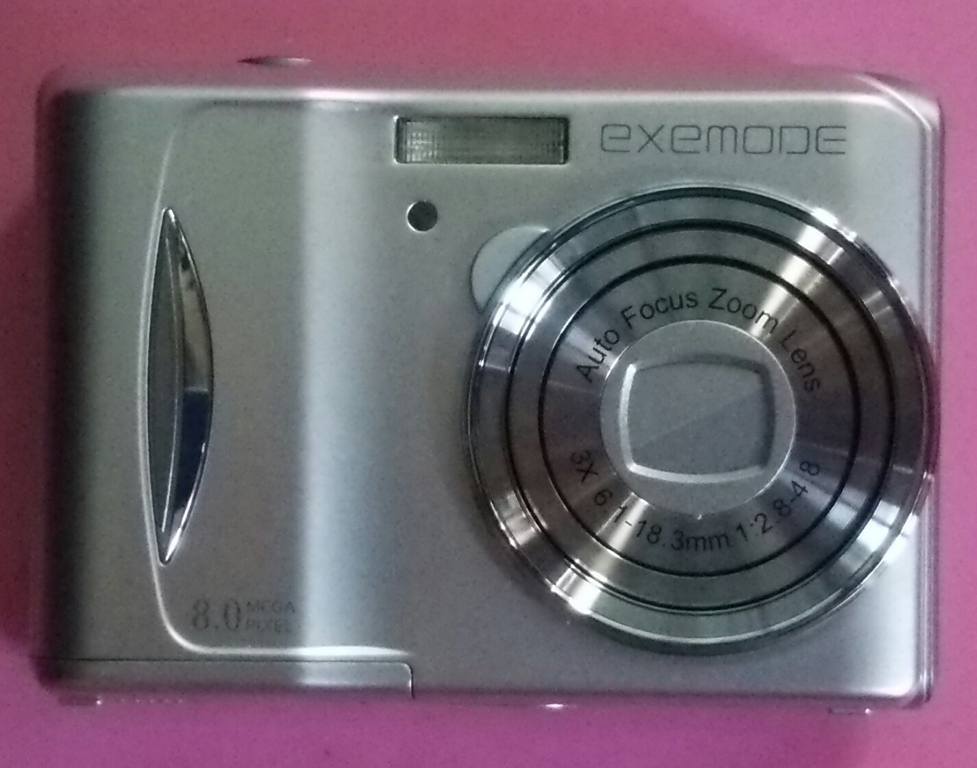 エグゼモードのデジカメ